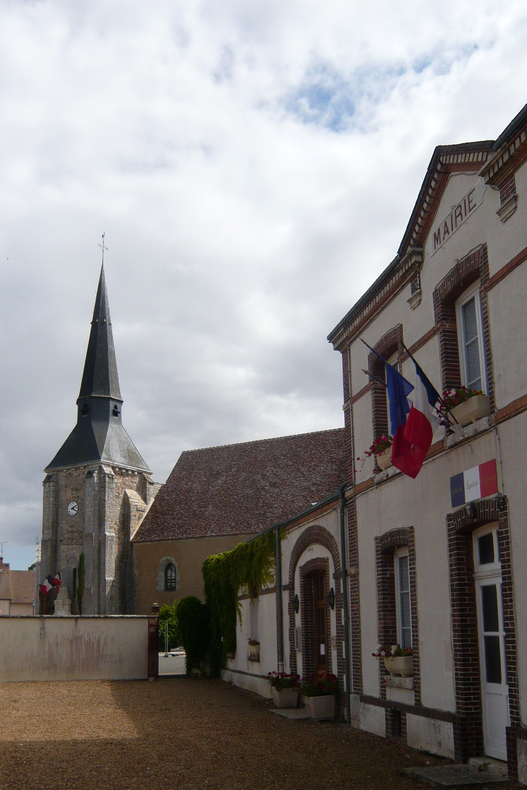 Mairie et église Saint-Séverin, Fontenay-sur-Eure, Eure-et-Loir (France).